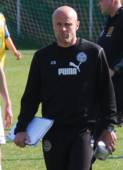 Fodboldtræneren Claus Struck fra Viborg FF.